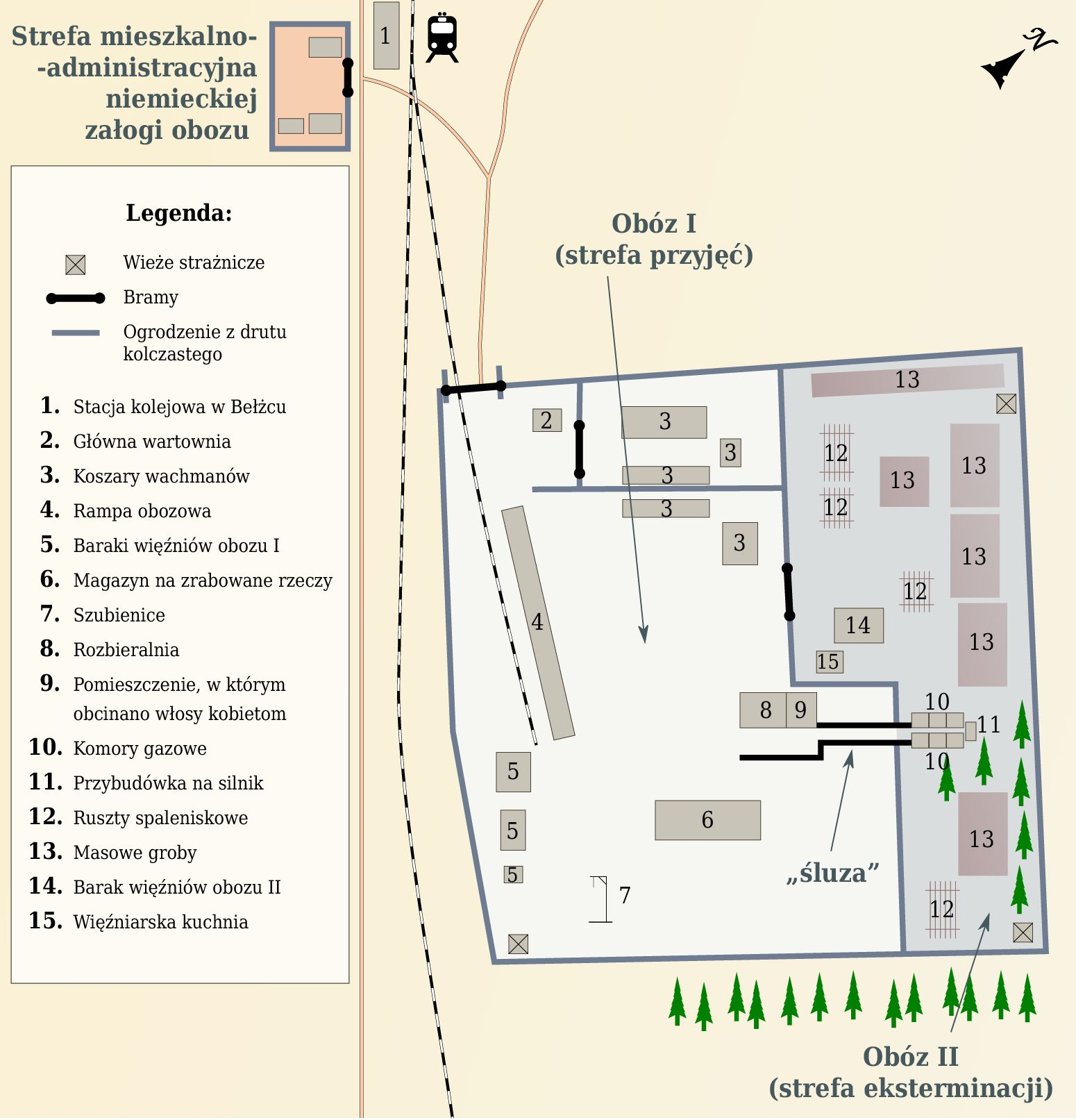 Plan obozu zagłady w Bełżcu